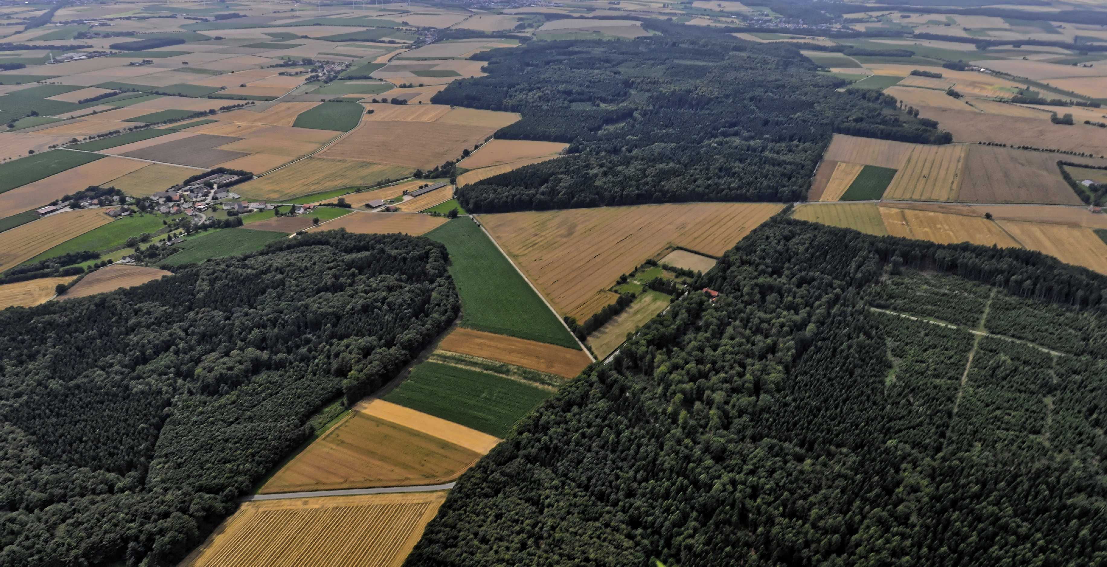 Bilder vom Flug Nordholz-Hammelburg 2015: Borgentreich-Drankhausen